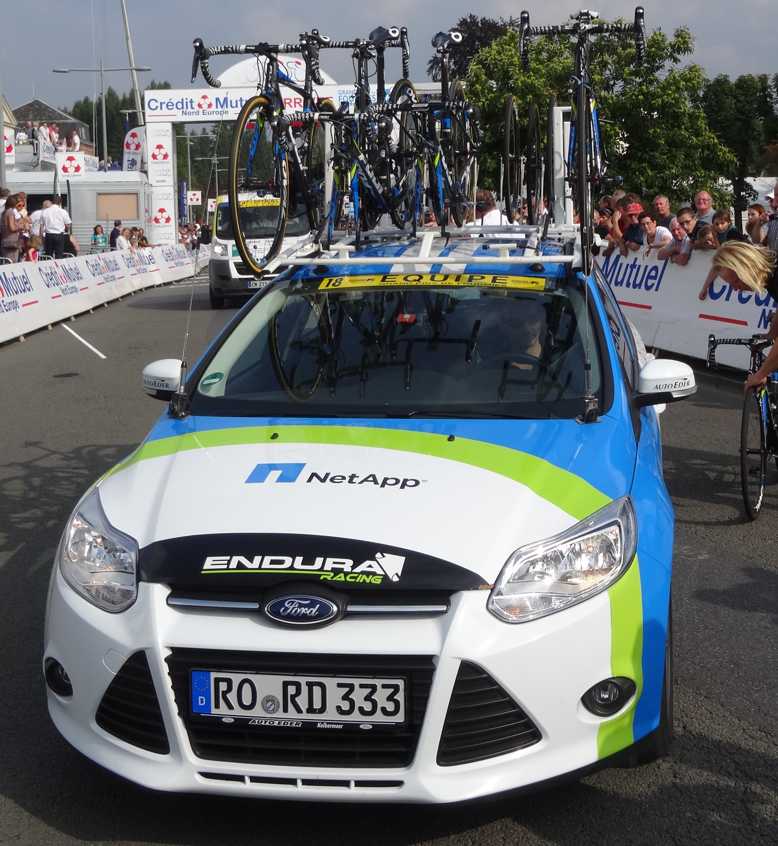 Reportage photographique réalisé le dimanche 7 septembre à l'occasion du départ et de l'arrivée du Grand Prix de Fourmies 2014 à Fourmies, Nord-Pas-de-Calais, France.